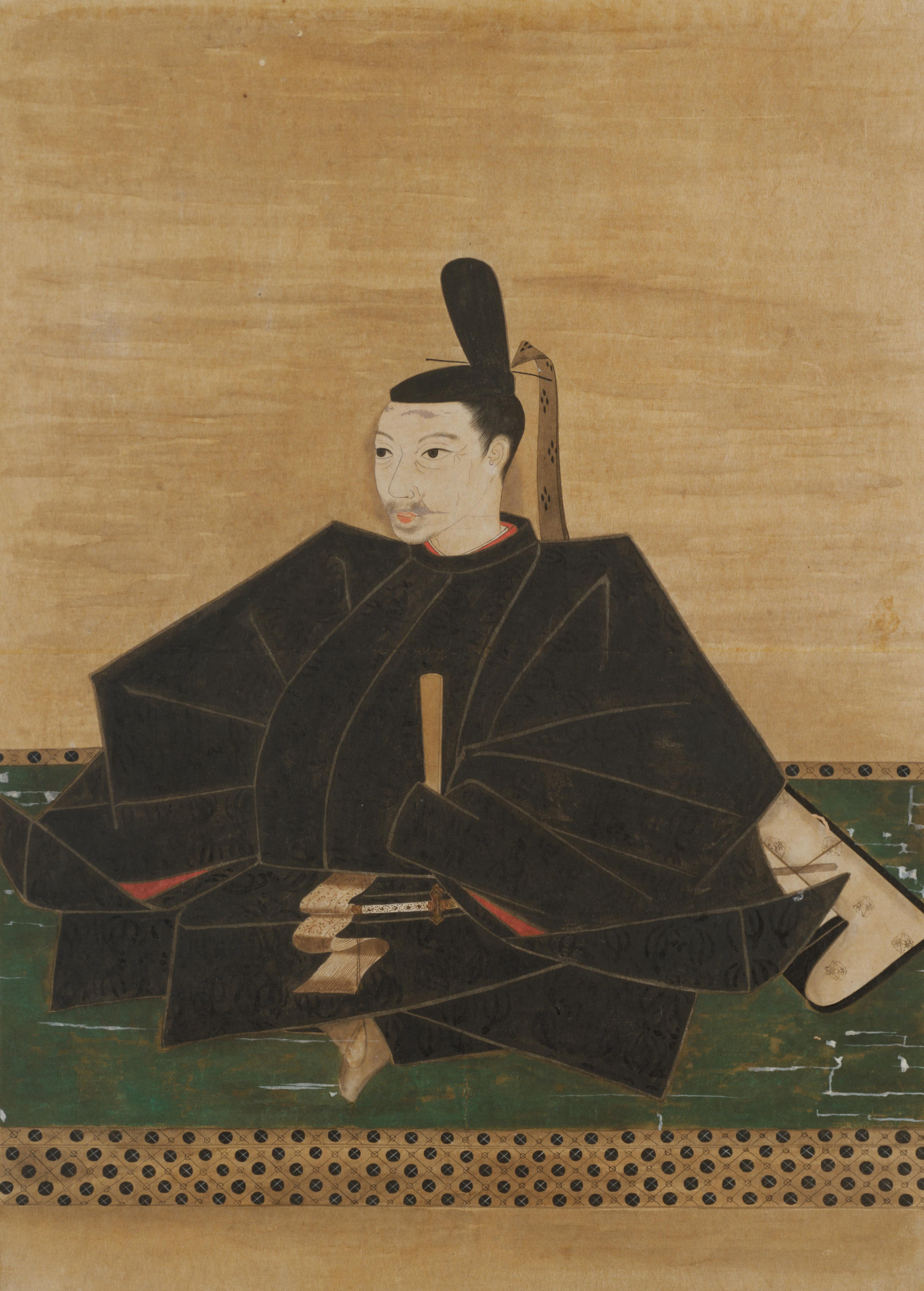 三条西家6代当主・三条西実枝の肖像画(模本)。